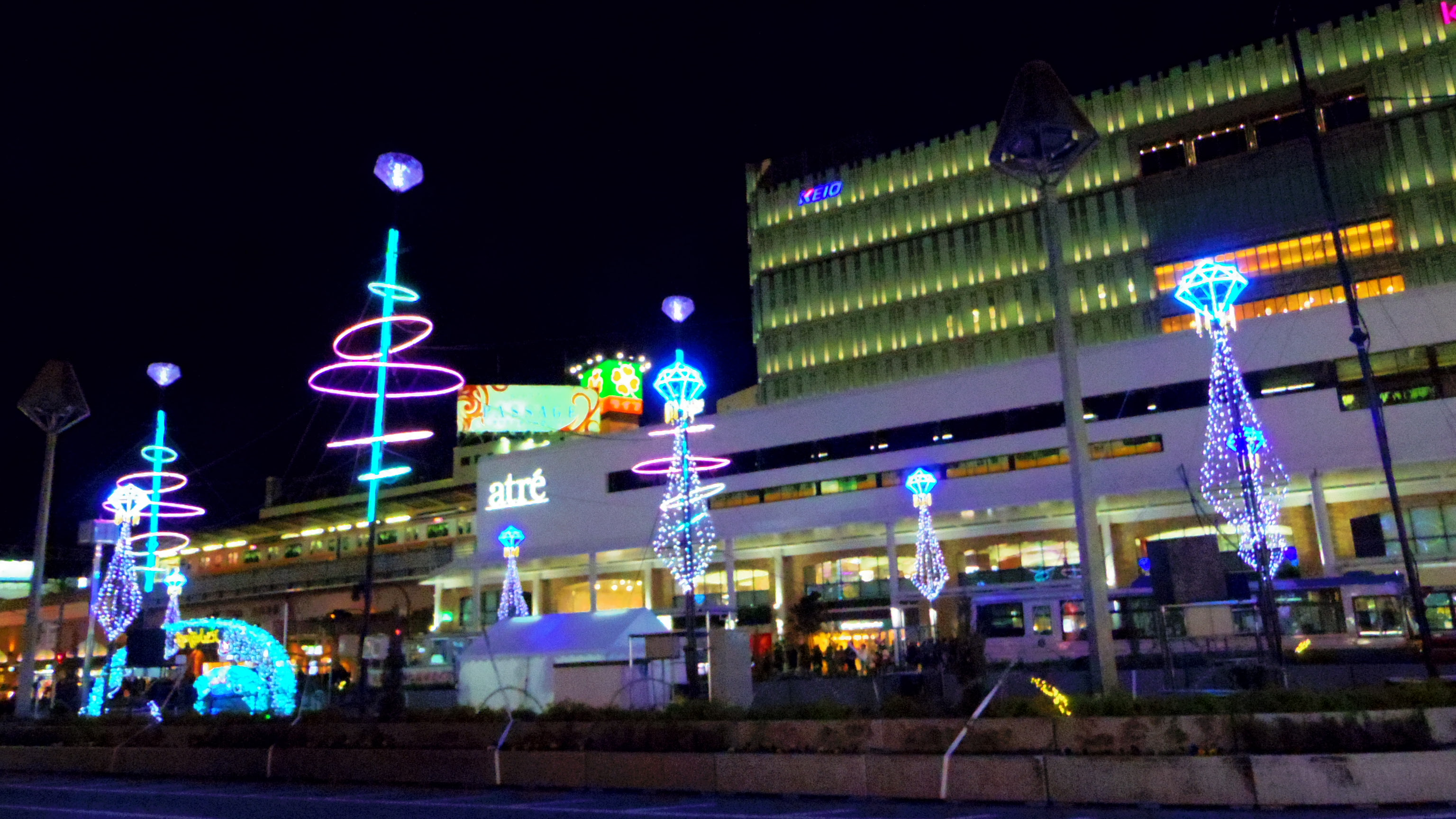 吉祥寺駅前イルミネーション（JR吉祥寺駅北口）。毎年11月～1月に開催、冬の風物詩として親しまれている。